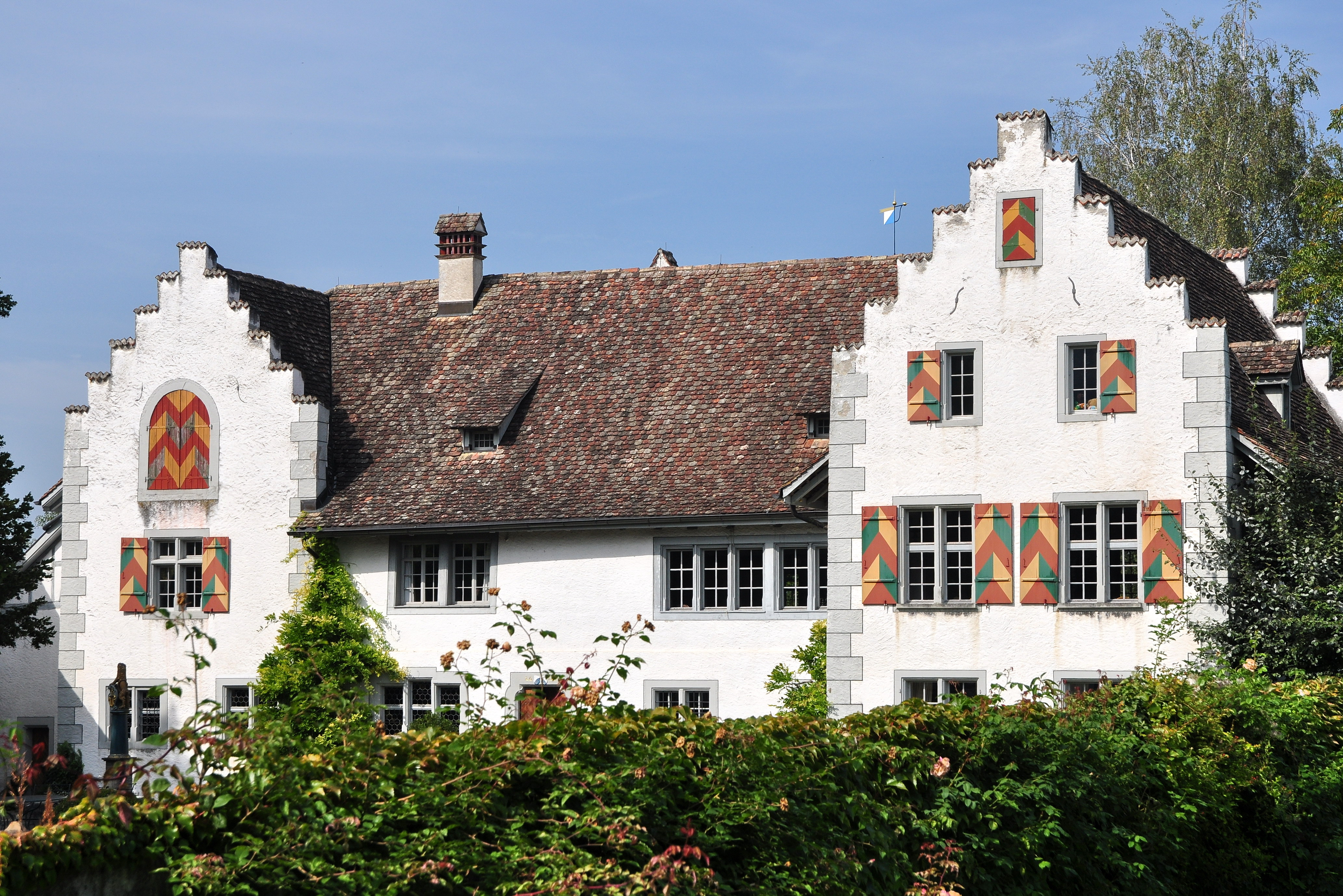 Schloss mit Oekonomie, Trotte und Brunnen, Schloss 396 in Flaach (Switzerland)